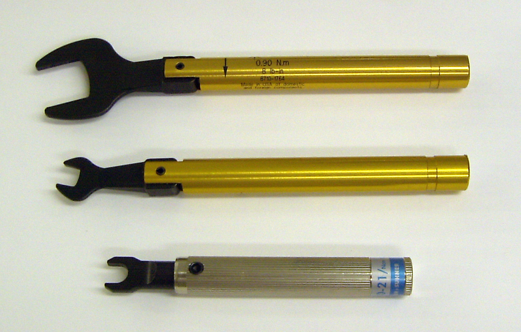 Llaves de par